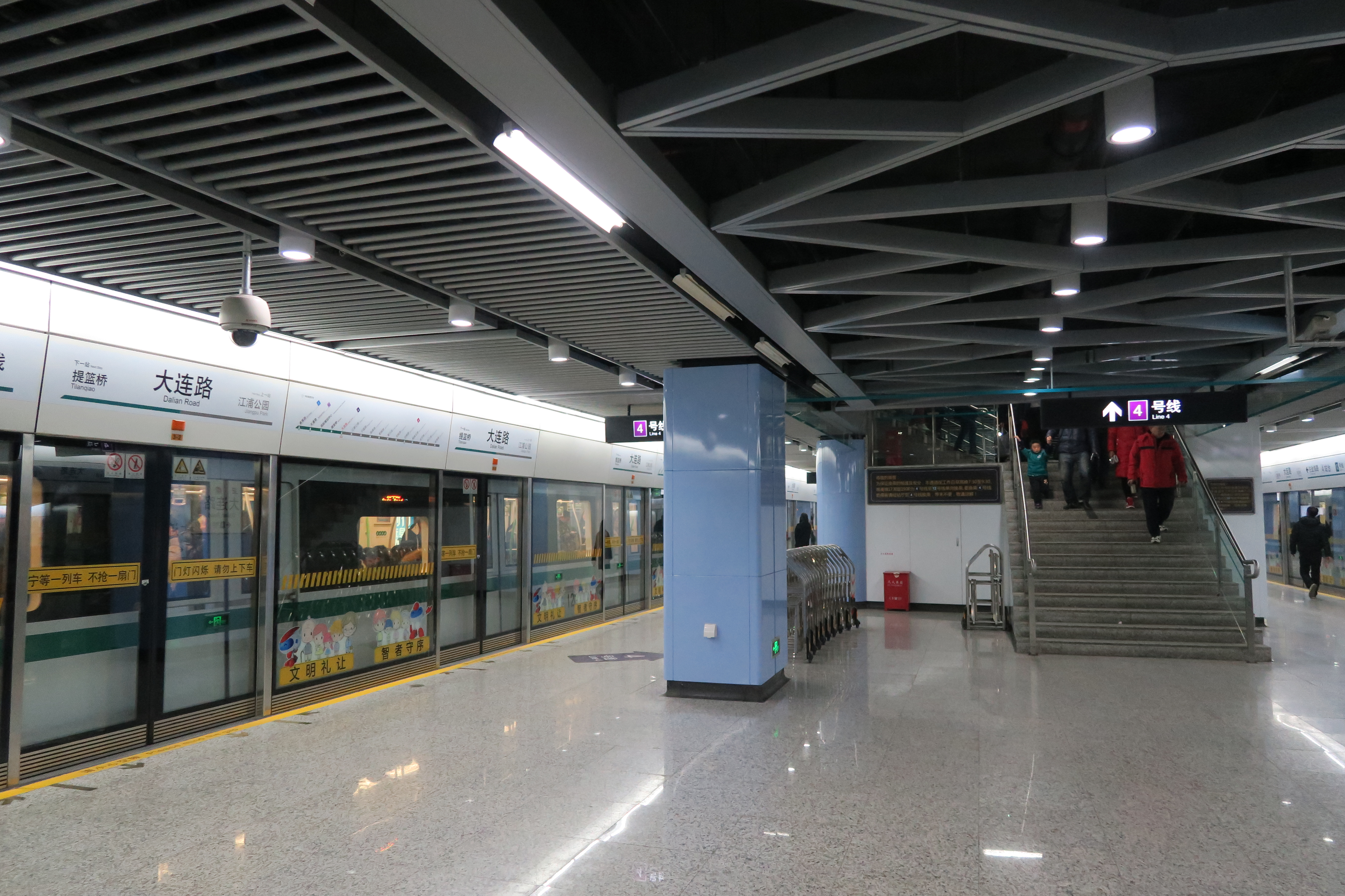 12号线大连路站